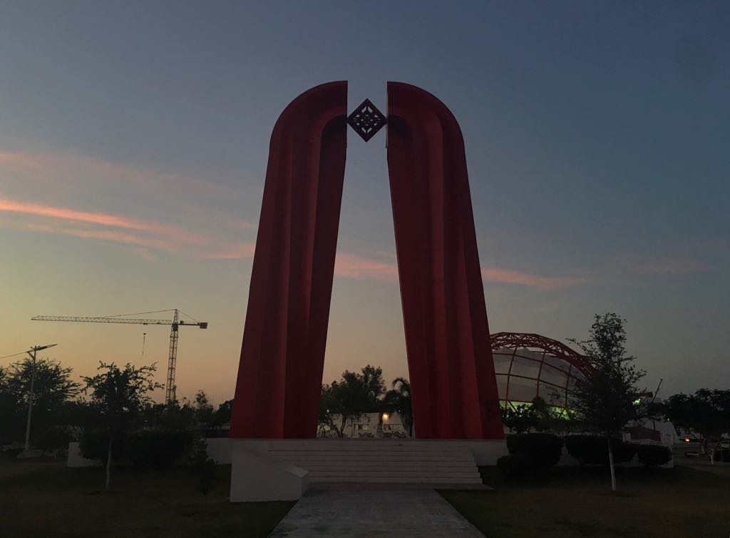 Escultura